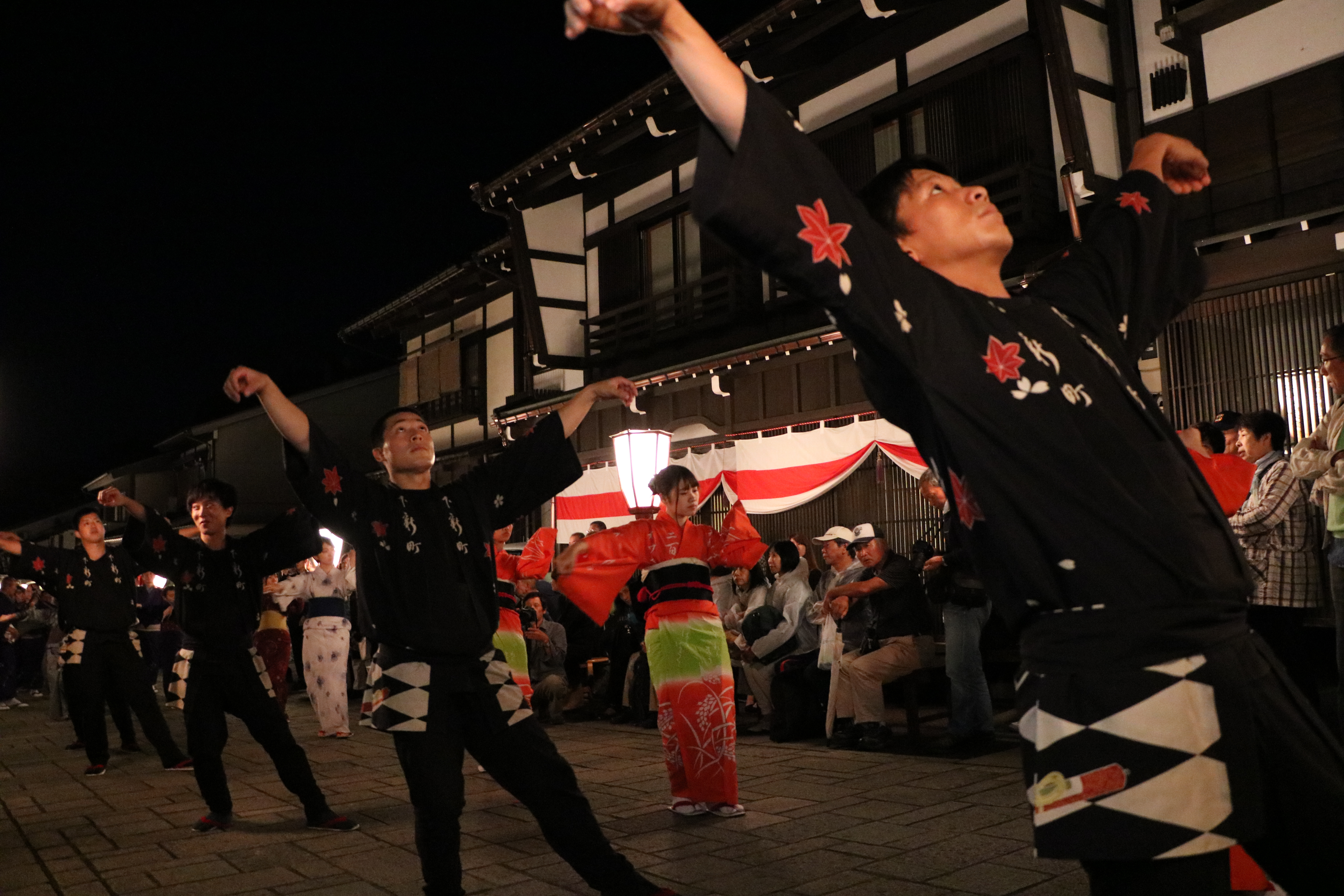 おわら風の盆。2017年9月3日深夜（日付が変わって4日）の諏訪町。富山県富山市八尾町。